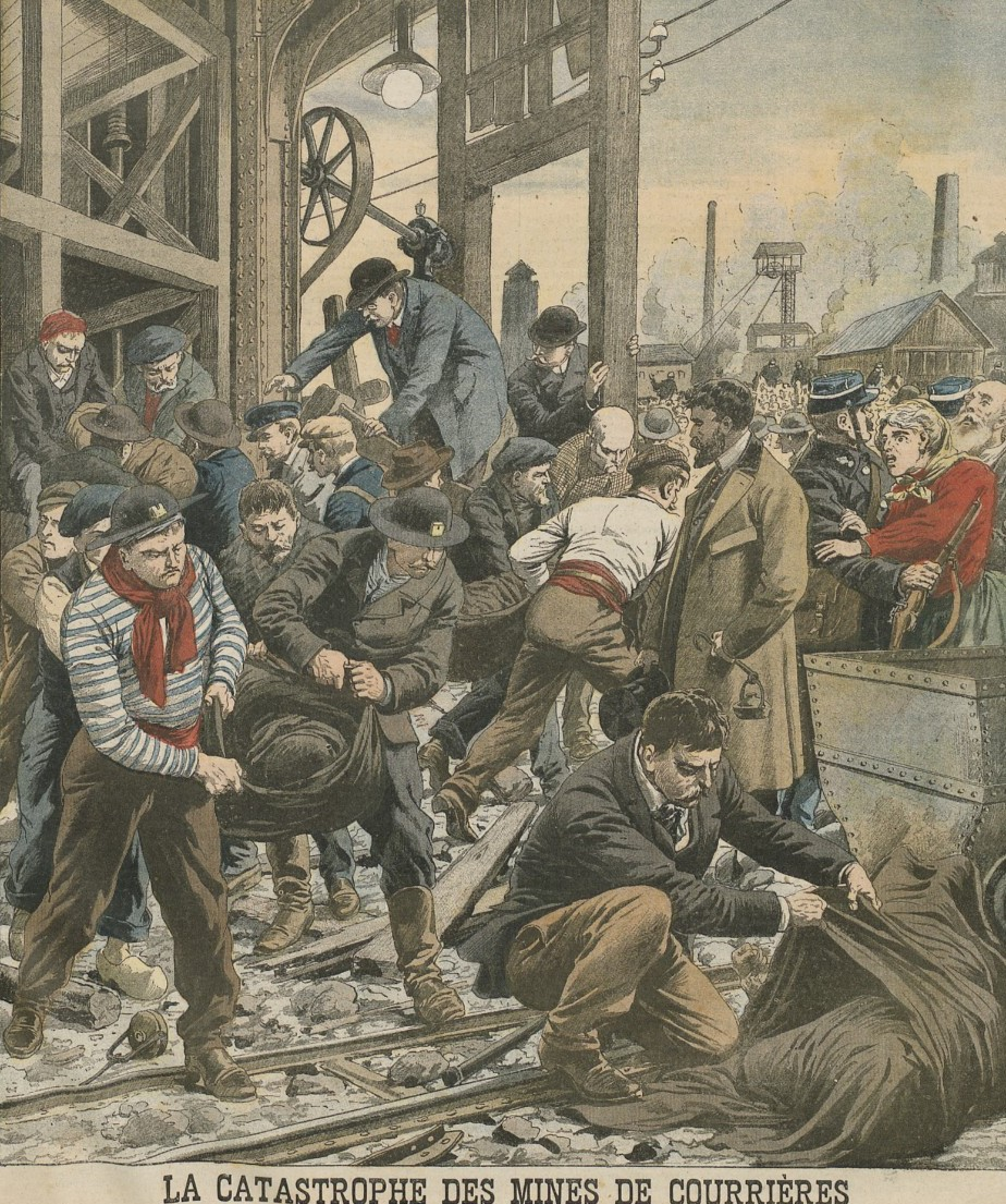 Bergung der Opfer des Grubenunglücks